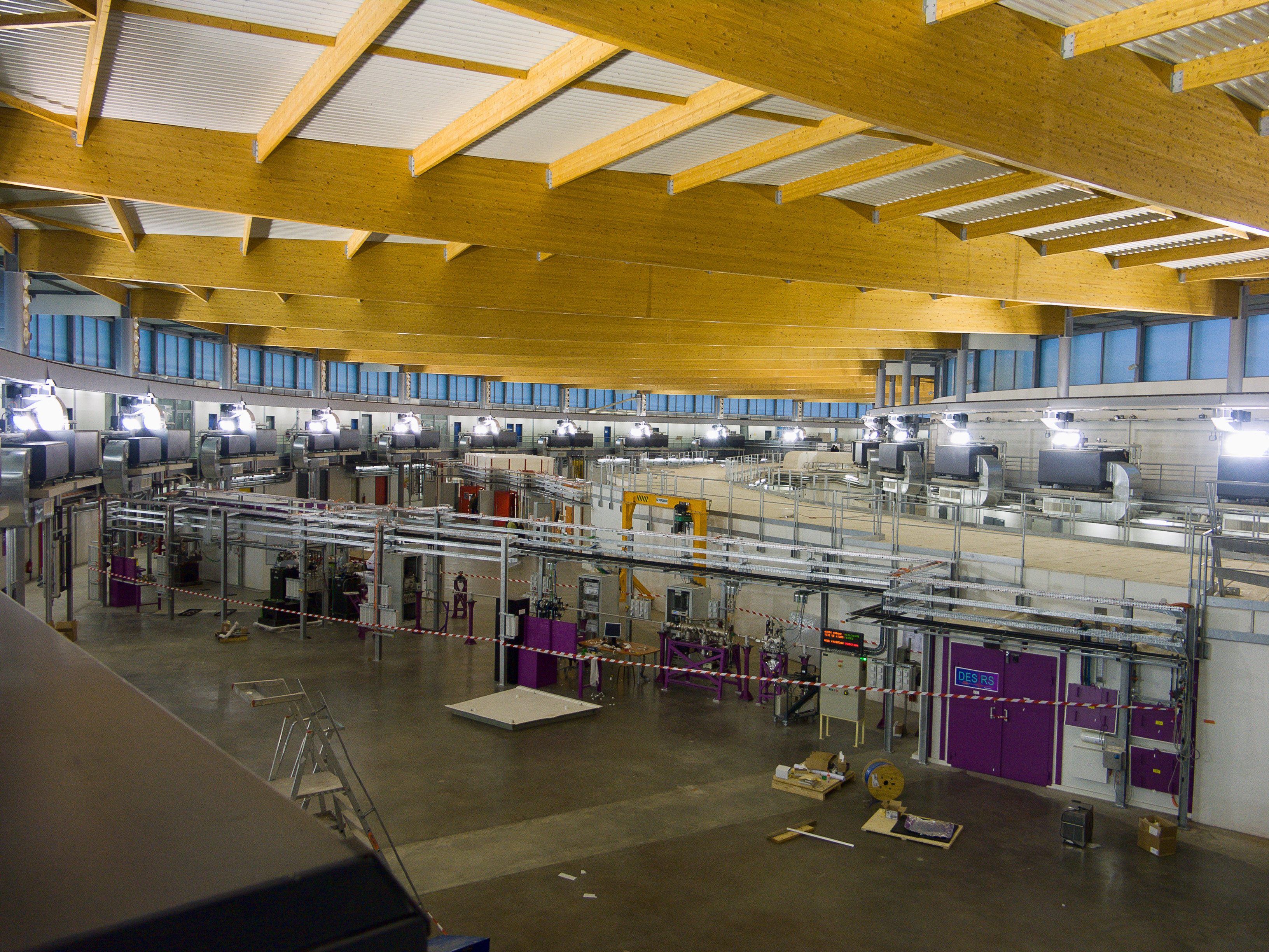 Vue de l'intérieur du Synchrotron Soleil, avec une ligne de lumière